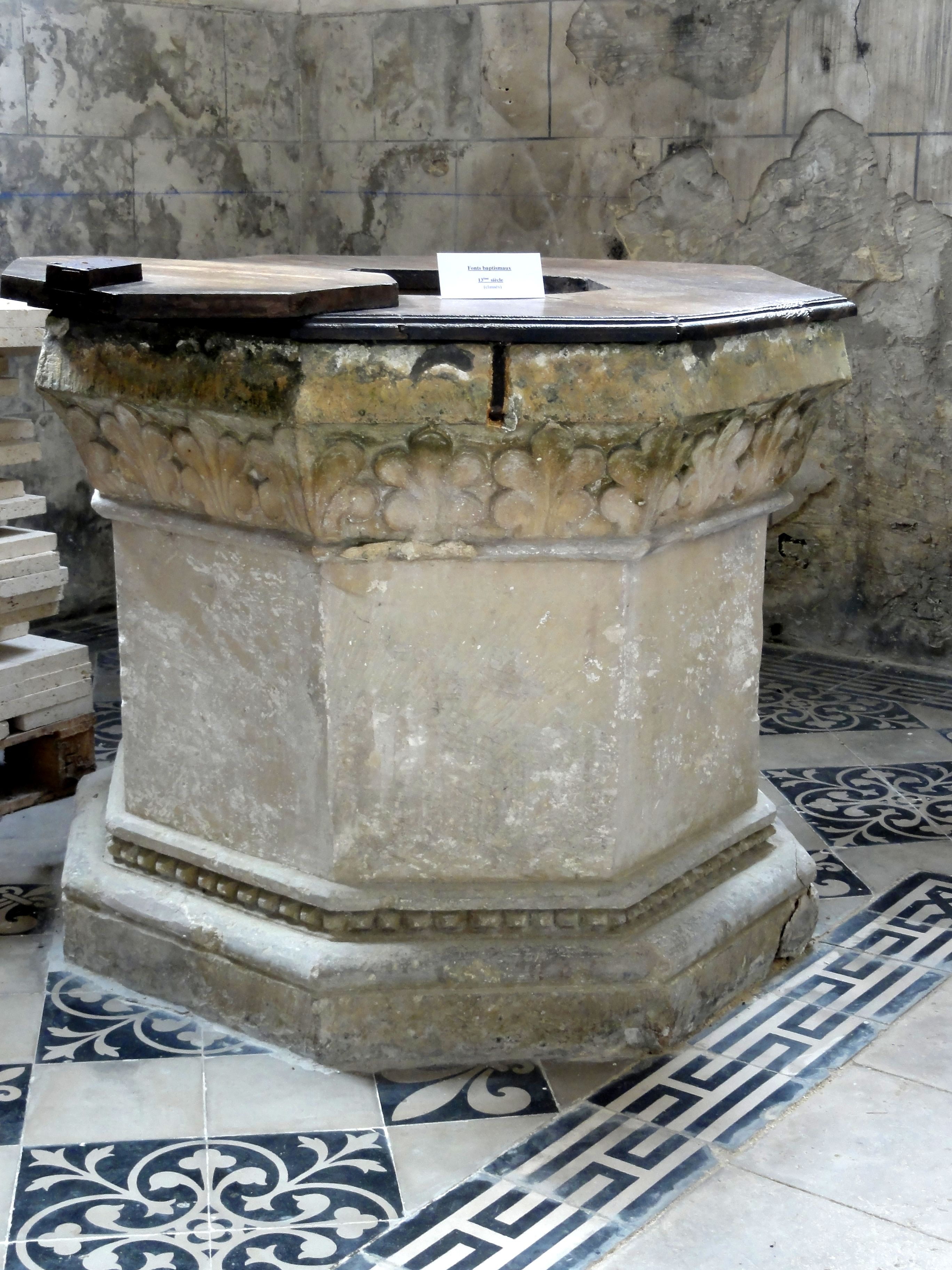 Fonts baptismaux.